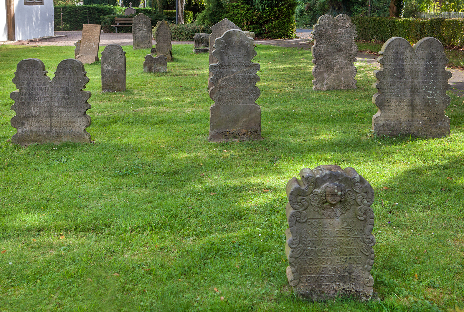 Alter Friedhof Wüsten (Bad Salzuflen) This is a photograph of an architectural monument.